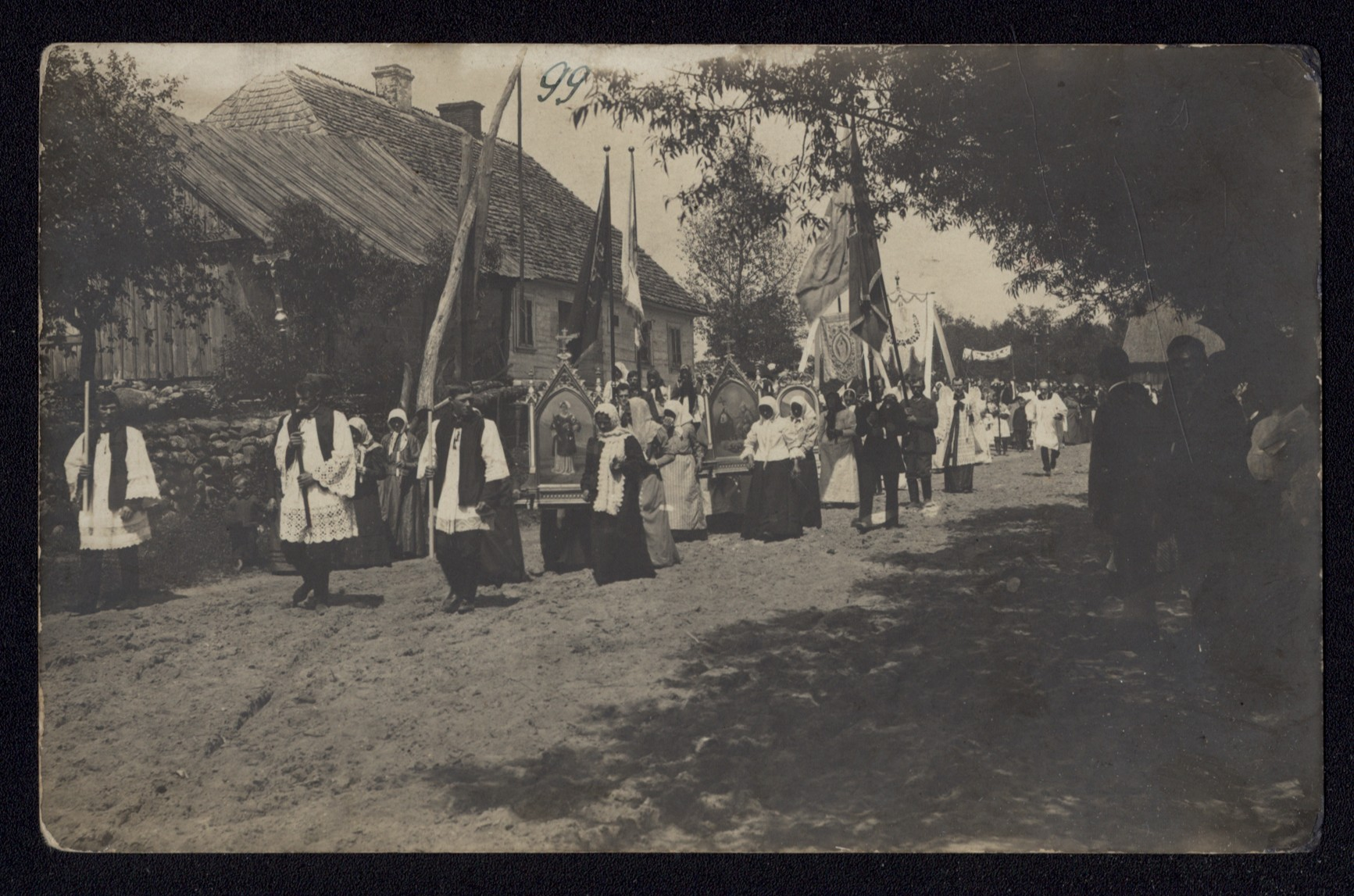 Беларуская (тарашкевіца): Працэсія Божага Цела зь Дзяляцічаў (Dzialacičy) у Любчу (Lubča)